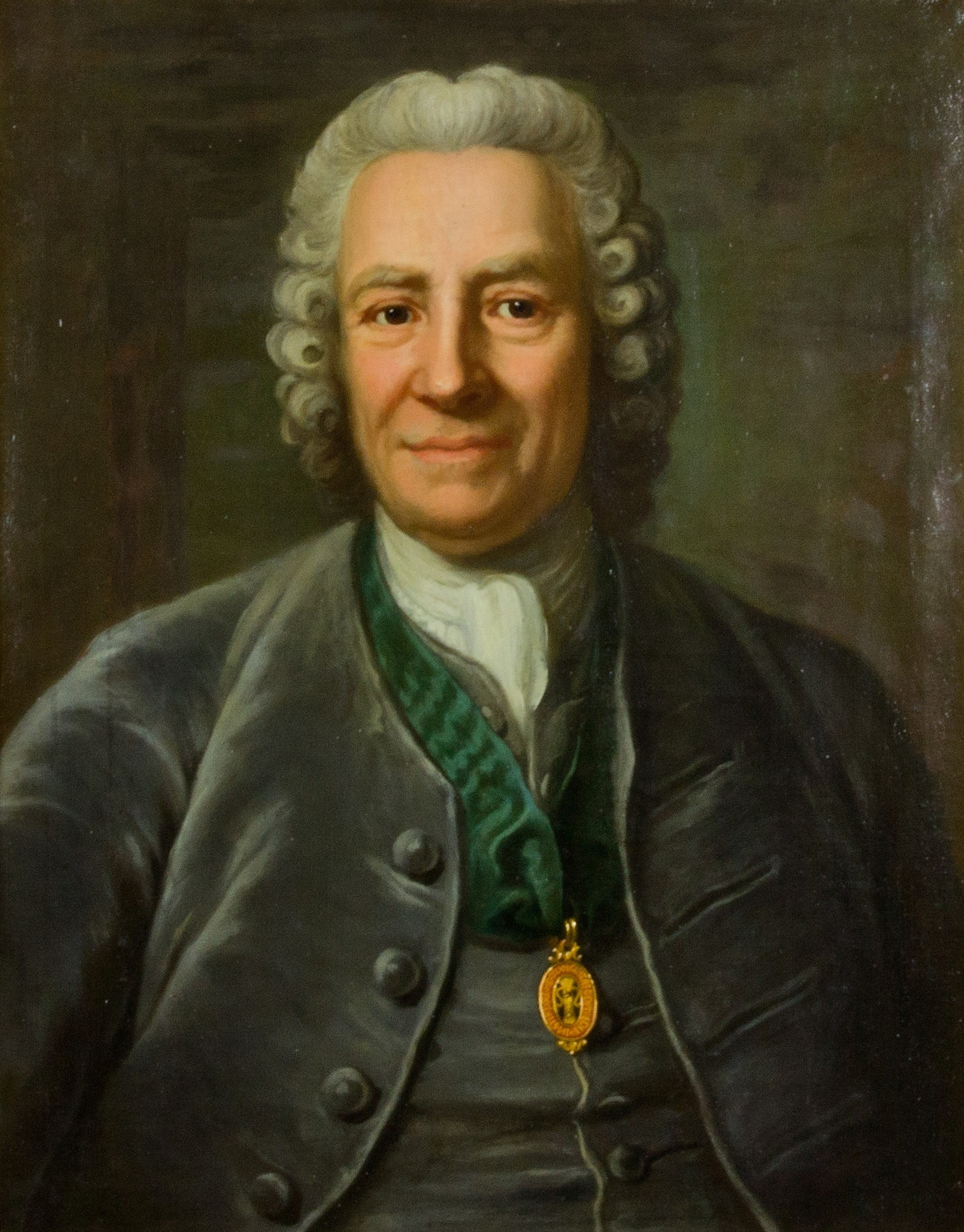 Porträtt av Charles Tottie (1703-1776) iklädd grön dräkt med Vasaorden runt halsen. Porträtt från ca 1760 av okänd.